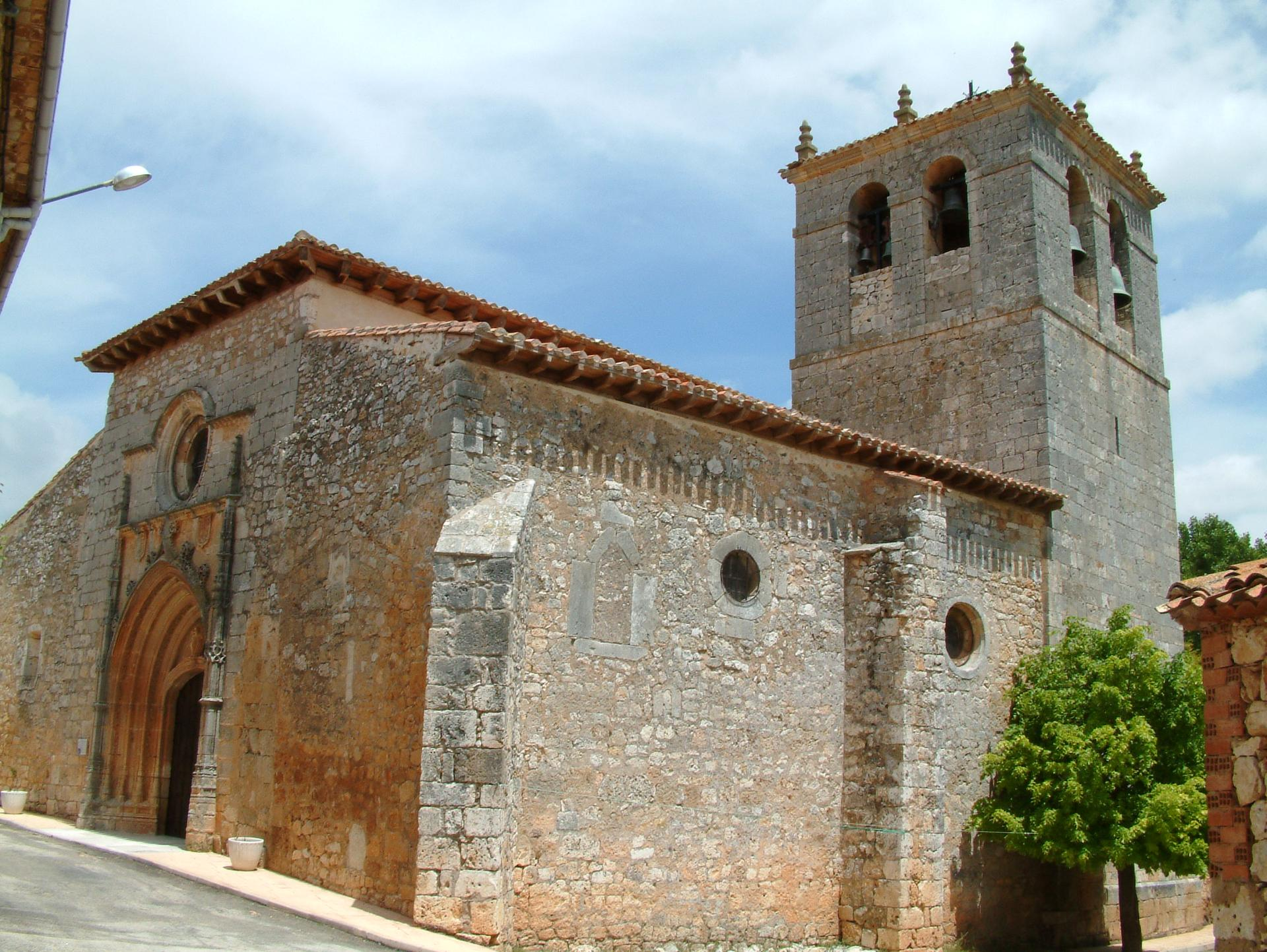 Iglesia de la Asunción de Nuestra Señora